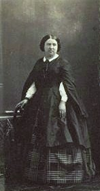 Графиня Софья Дмитриевна Толстая, ур. Бибикова (1827—1907)